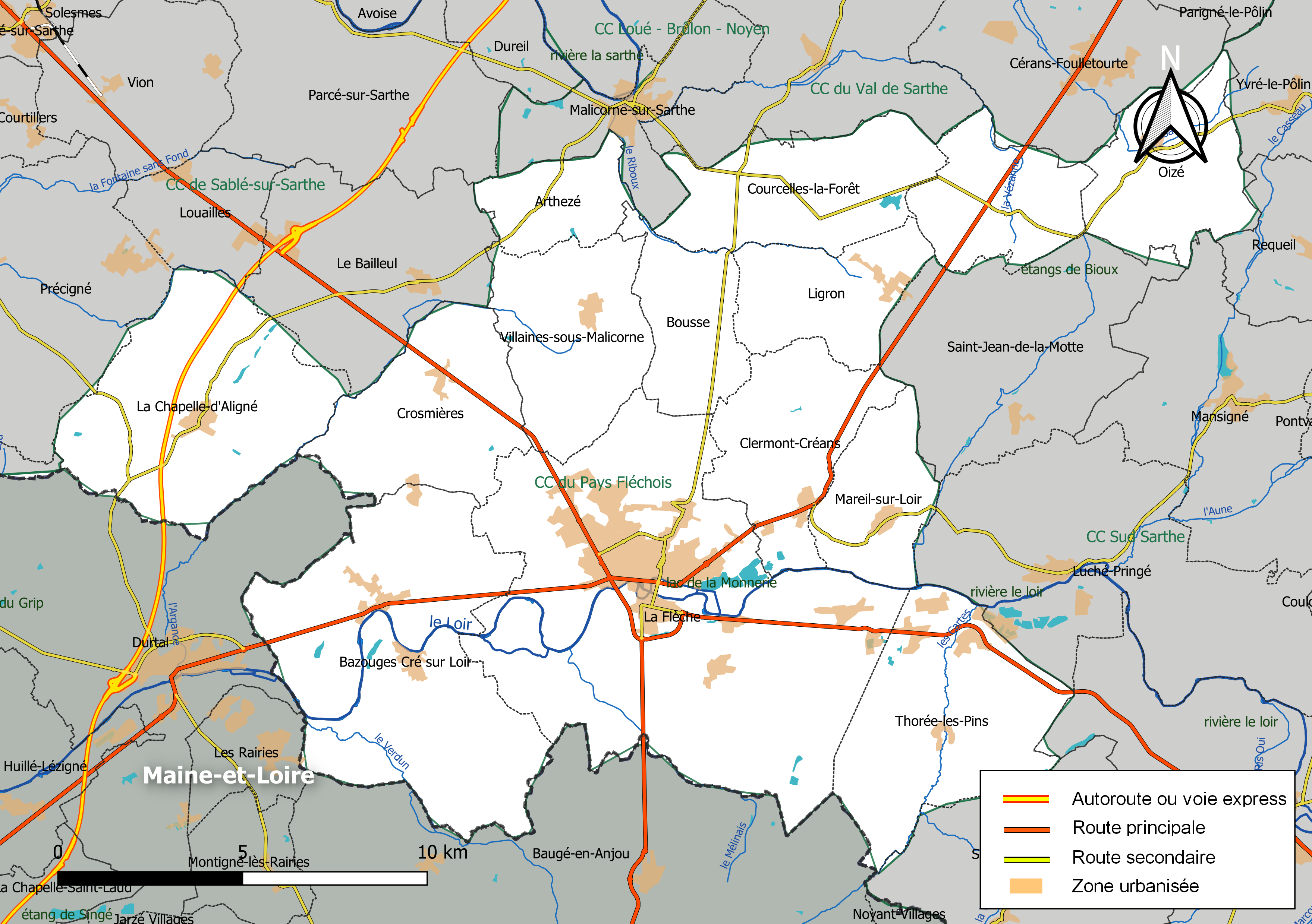 Carte géographique de la Communauté de communes du Pays Fléchois, département de la Sarthe, France. Composition au 1er janvier 2019.